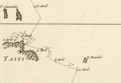 Détail de Tahiti et de l'île le Boudoir (Mehetia)